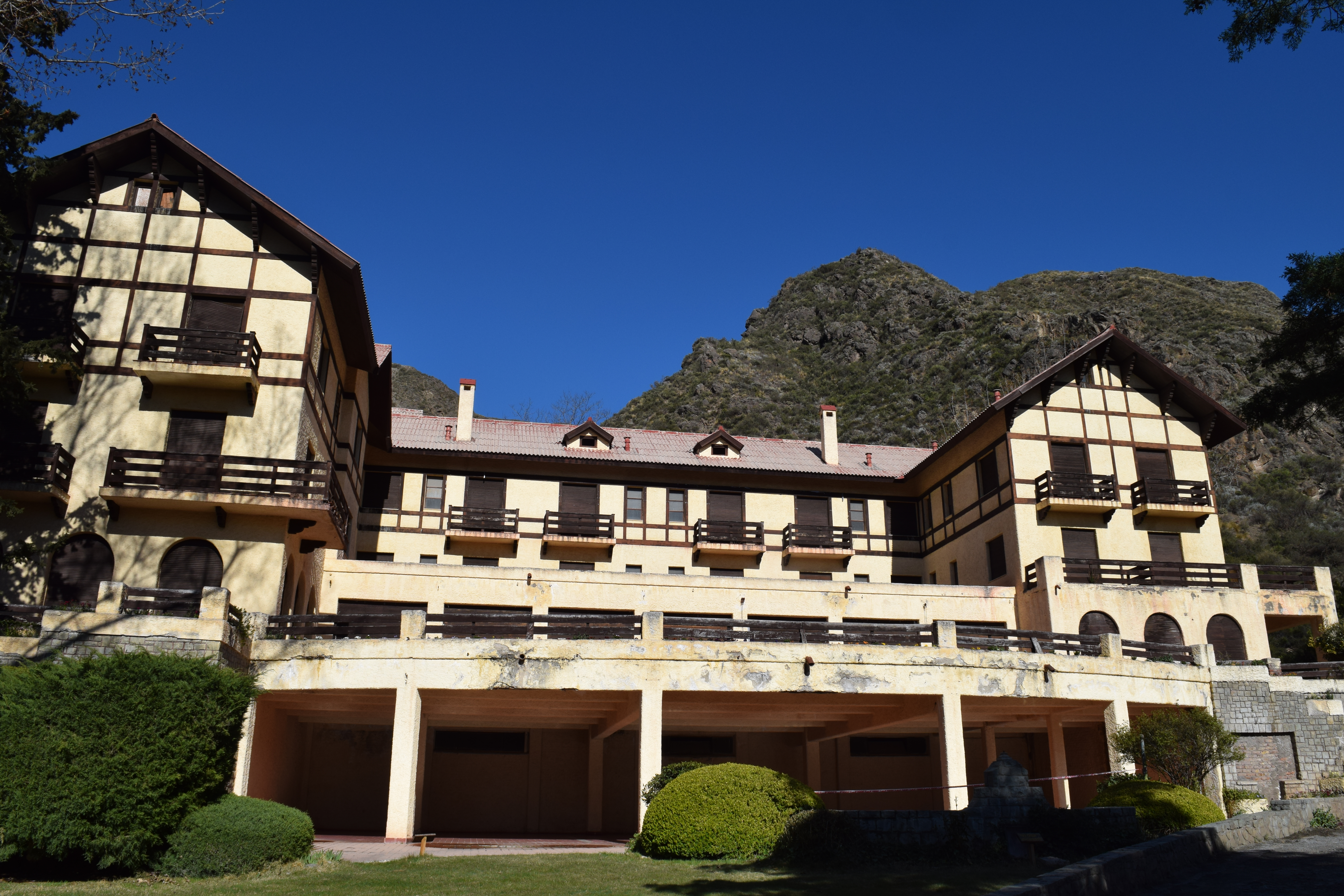 El edificio del Gran Hotel Villavicencio ubicado dentro de la Reserva Natural Villavicencio, en Mendoza, Argentina.